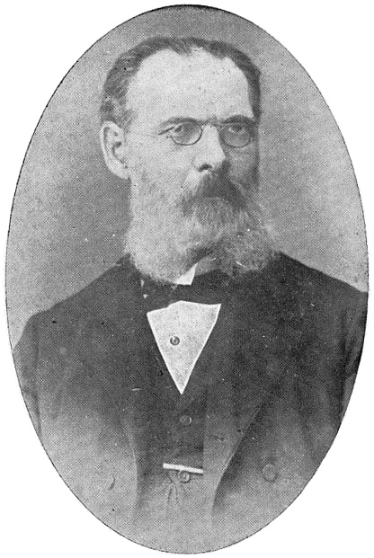 Francisco María de la Iglesia